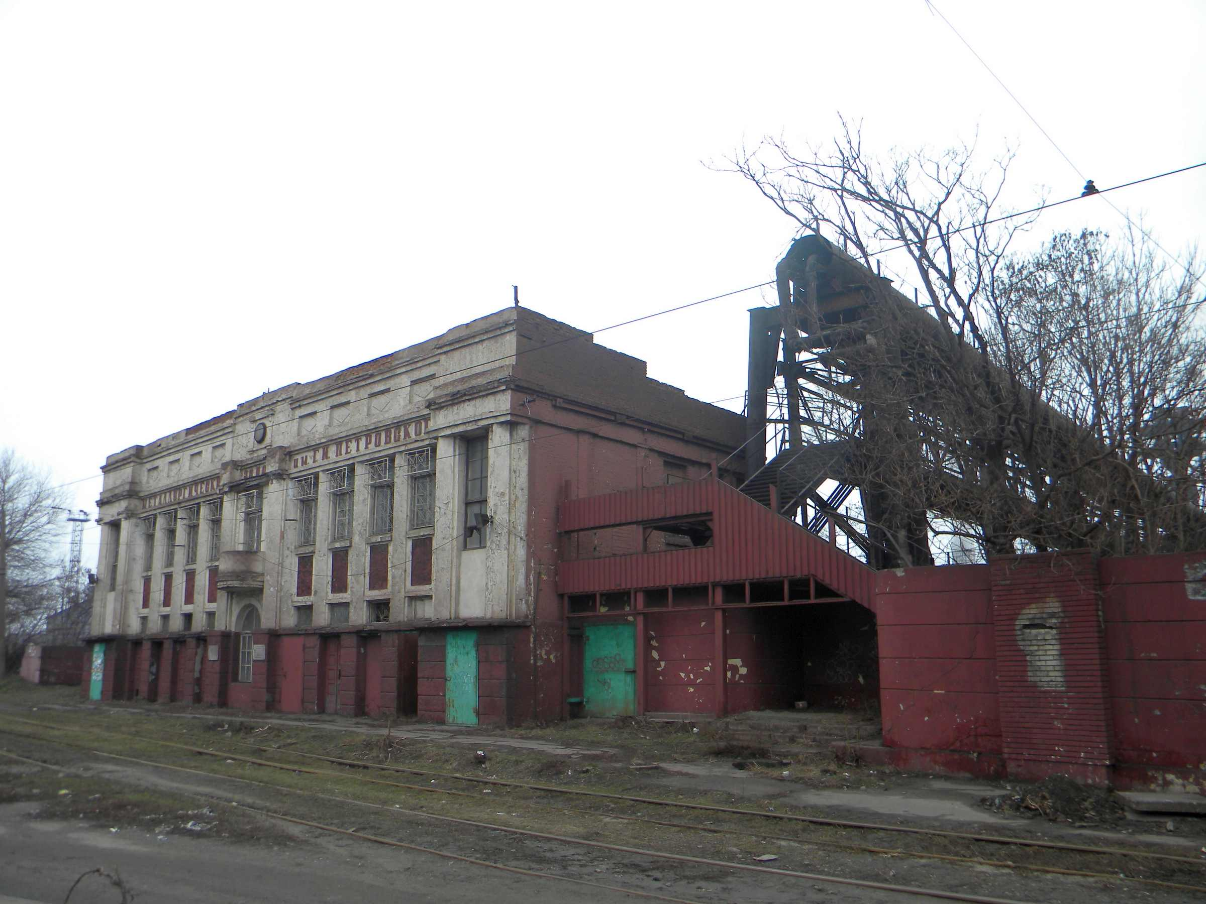 Мем. дошка Пам'ятний знак на честь Курако М.К. - видатного російського доменщика (1890-1891 рр.), Дніпро, Маяковського вул., 3